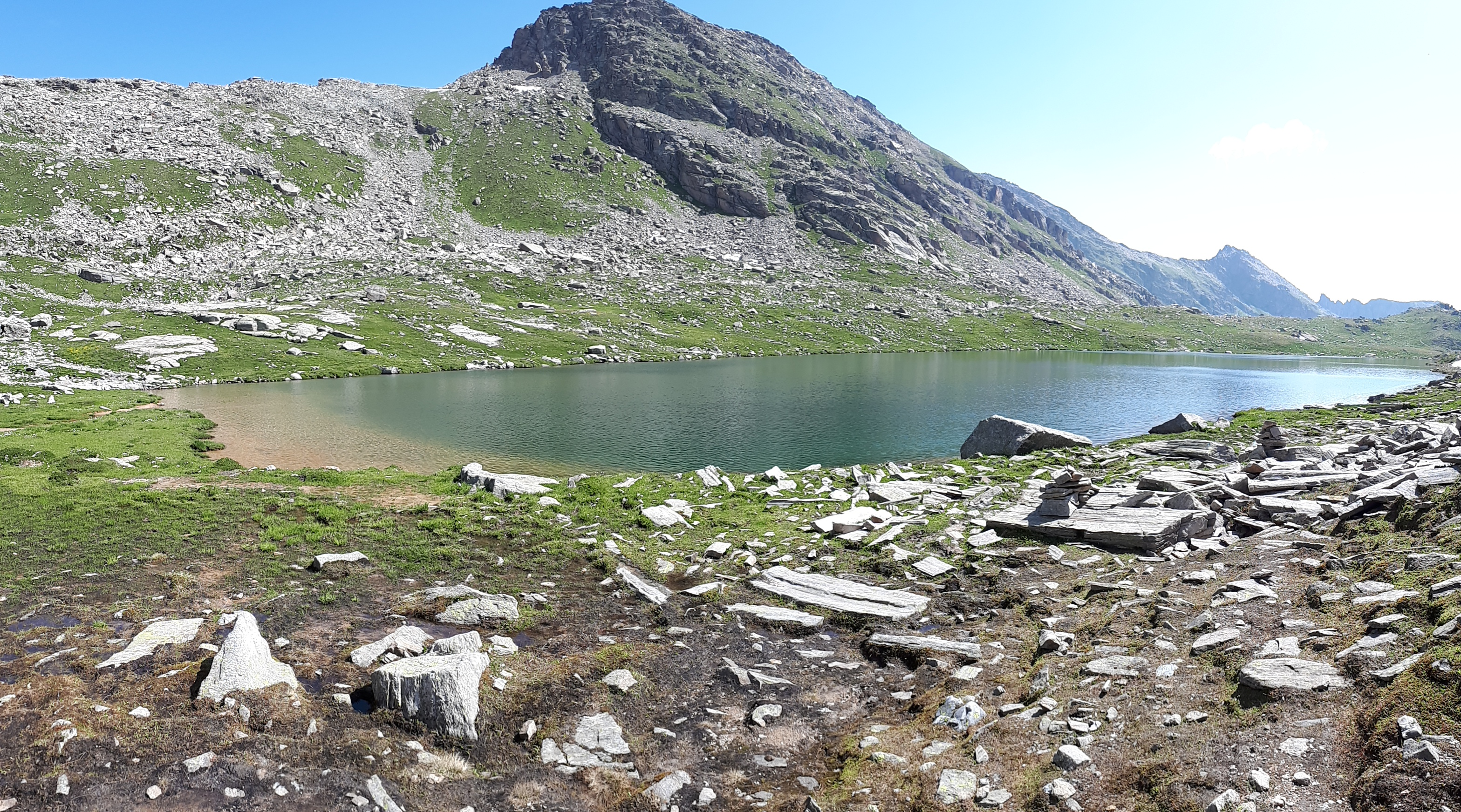 Il lago ed alle spalle il monte Bellagarda